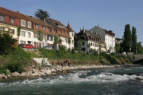 Birsfelden: Birsquai und Birs